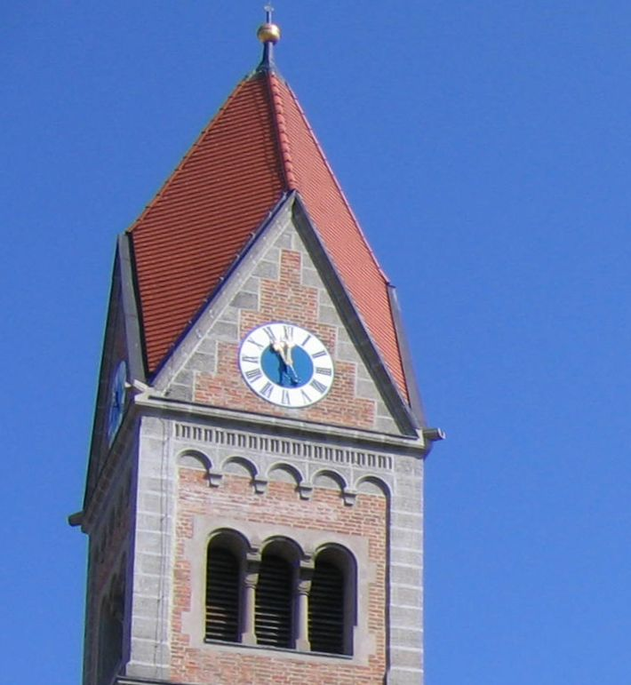 Die Turmspitze der Weicheringer Kirche